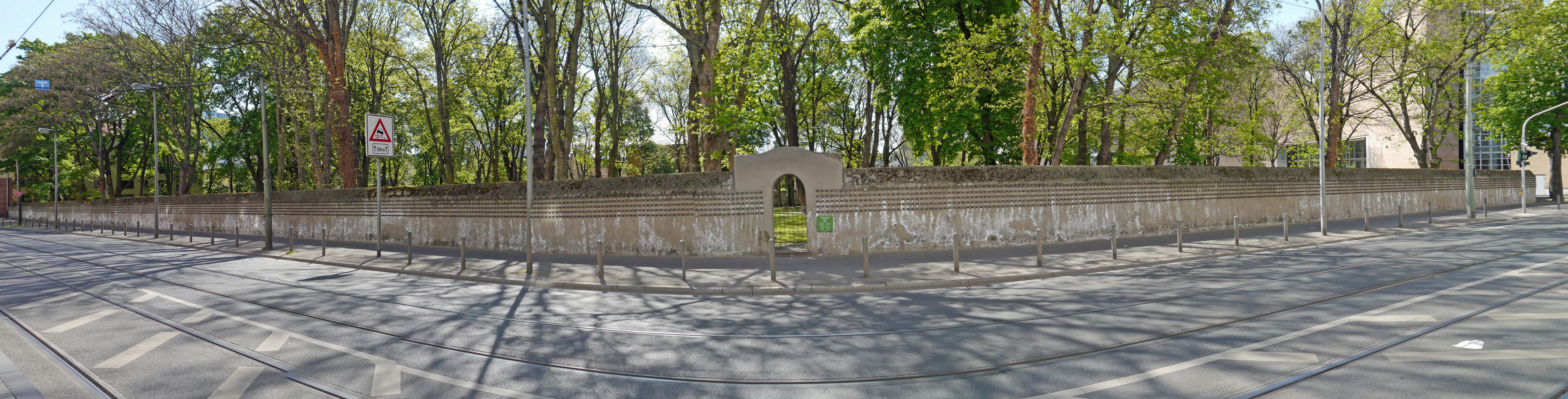 Die Nordseite des Alten Jüdischen Friedhofs in der Battonnstrasse in Frankfurt am Main - Innenstadt.